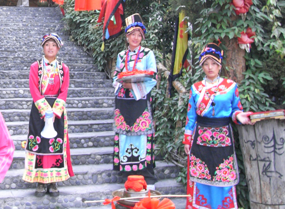 Femmes de la minorité Qiang 客家語/Hak-kâ-ngî: Kiong-tshu̍k.